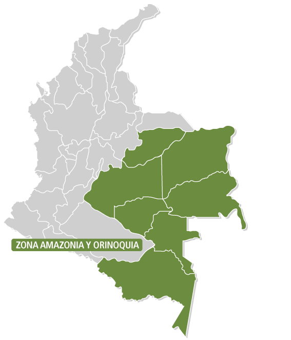 Mapa de las sedes a Nivel Nacional